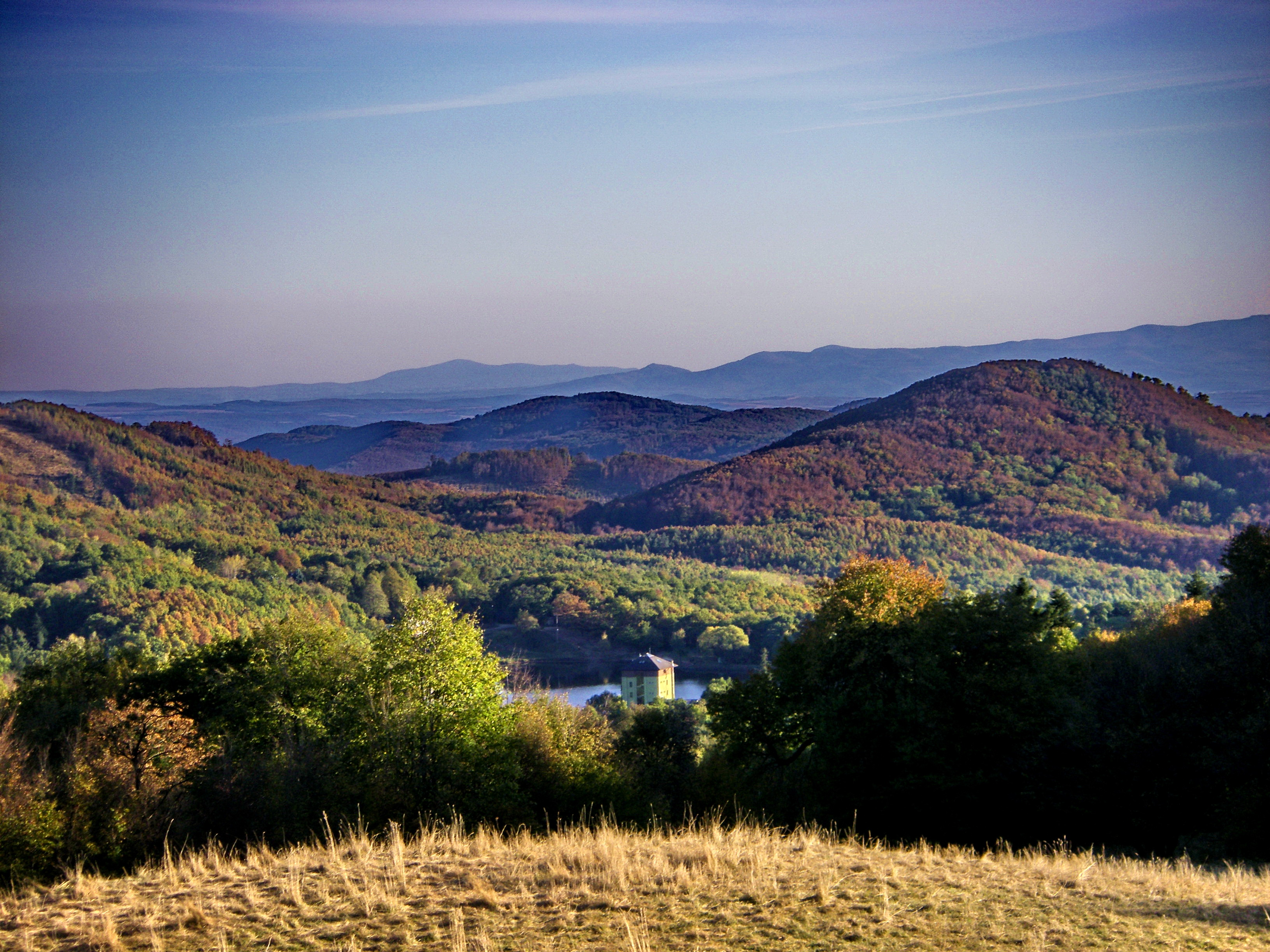 Nádrž vodná